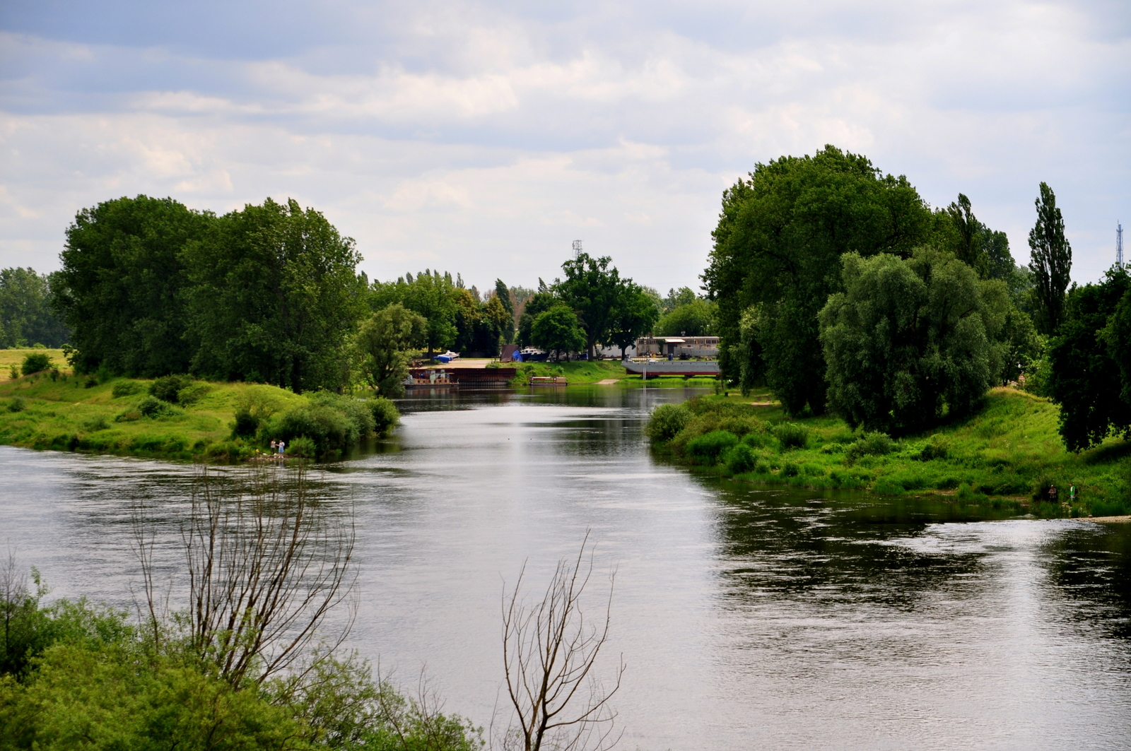 Gorzów Wielkopolski - widok portu rzecznego